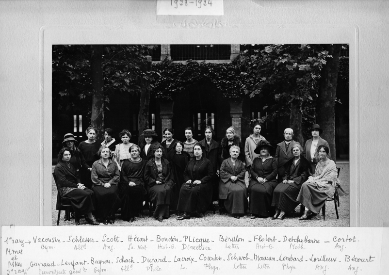 Photographie des professeurs du lycée Molière de l'année scolaire 1923-1924, effectuée dans la cour de l'établissement. En dessous, les noms des enseignantes et leurs matières enseignées.